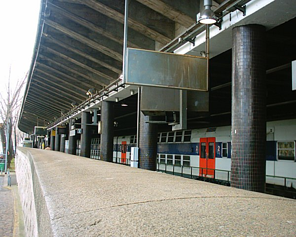 Champs de Mars Station, Paris.